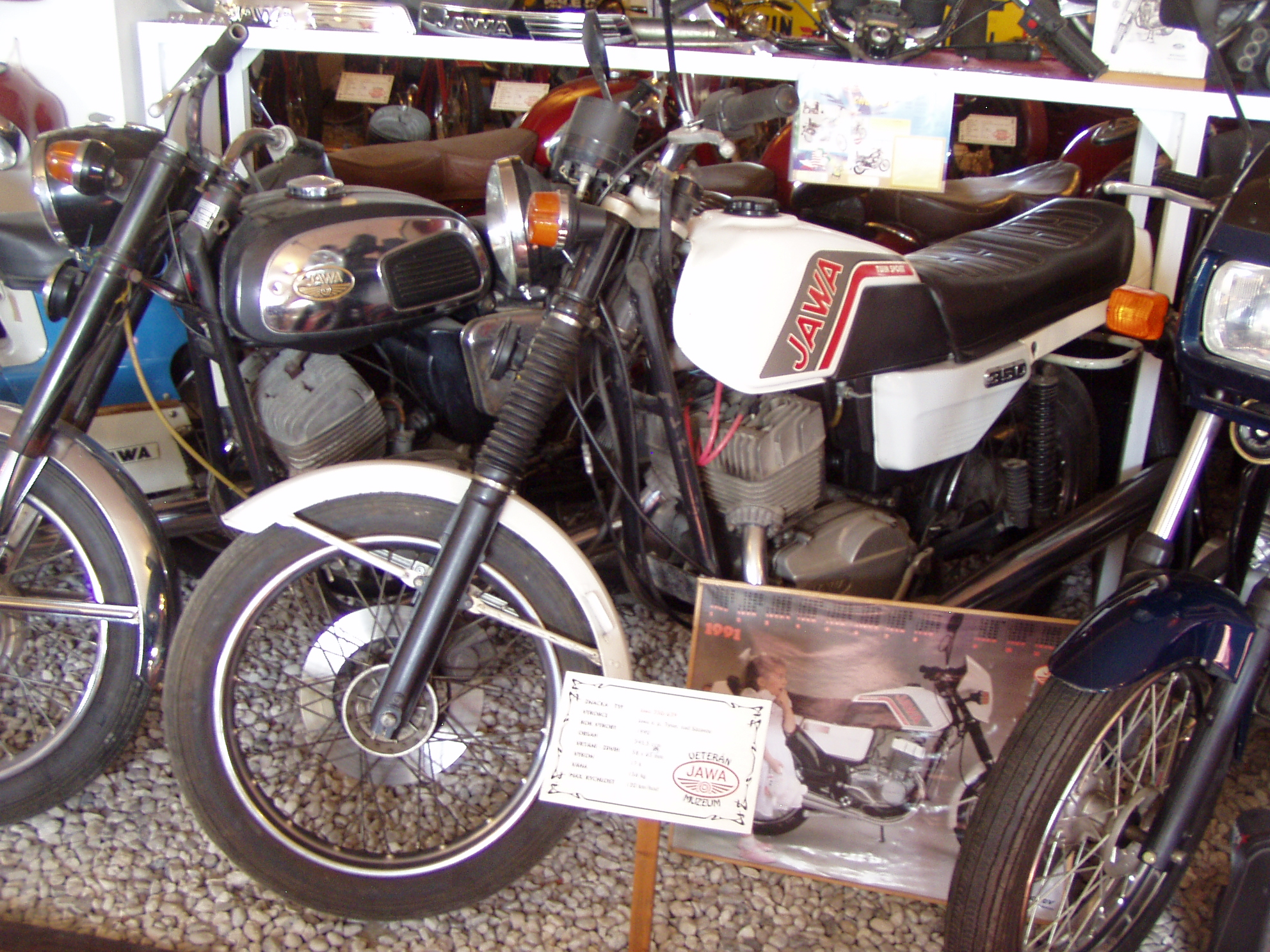 Jawa 350/639 (1990)